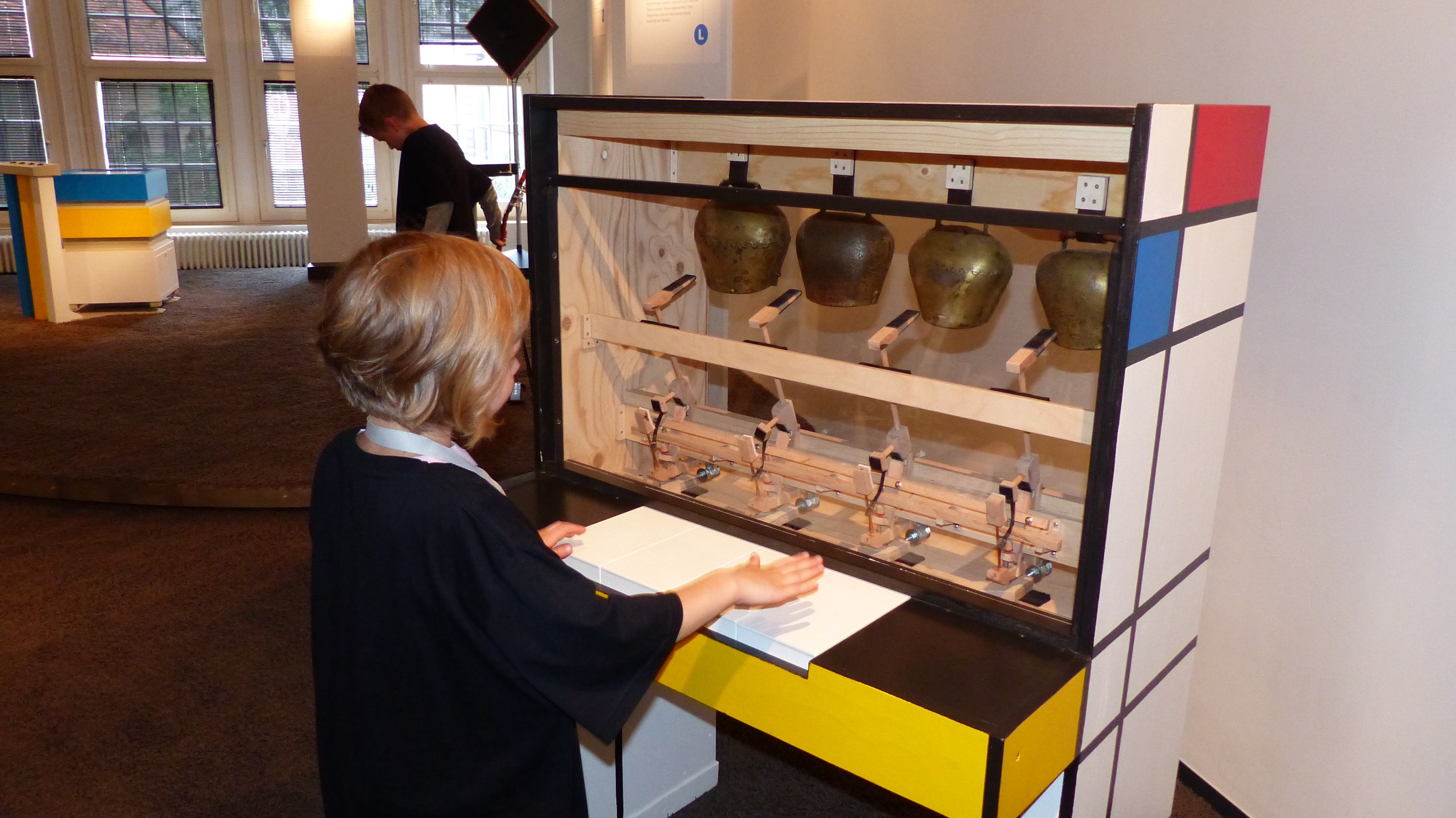 Aktives Musizieren von Kindern im Haus der Musik (Fruchtkasten), Landesmuseum Württemberg, Stuttgart